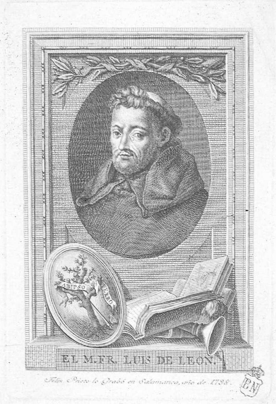 Fray Luis de León, aguafuerte de Félix Prieto, firmado: Félix Prieto lo Grabó en Salamanca, año de 1798. Ilustración de la Traducción de los Cantares de Salomón por Fr. Luis de León. Salamanca, 1798